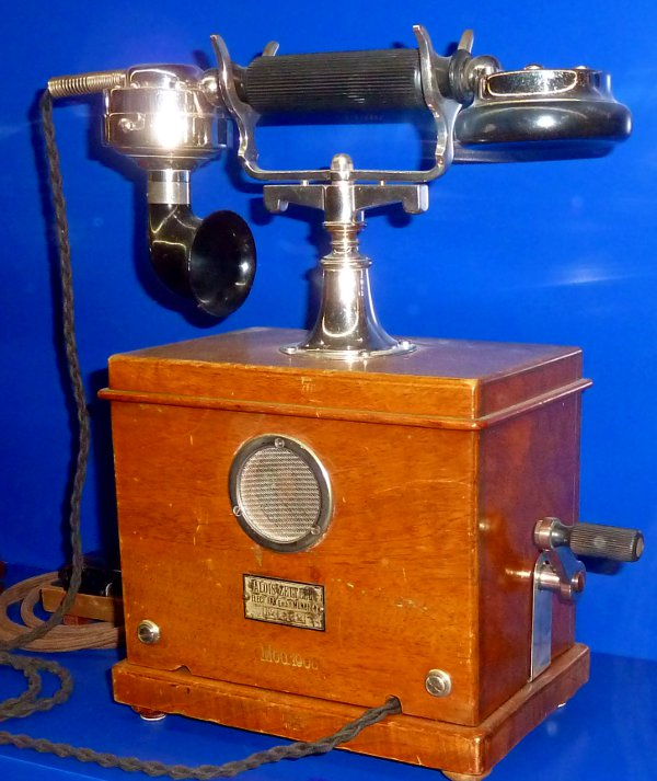 Fernsprechtischapparat EB 08 von der Firma Zettler aus München, Baujahr 1908